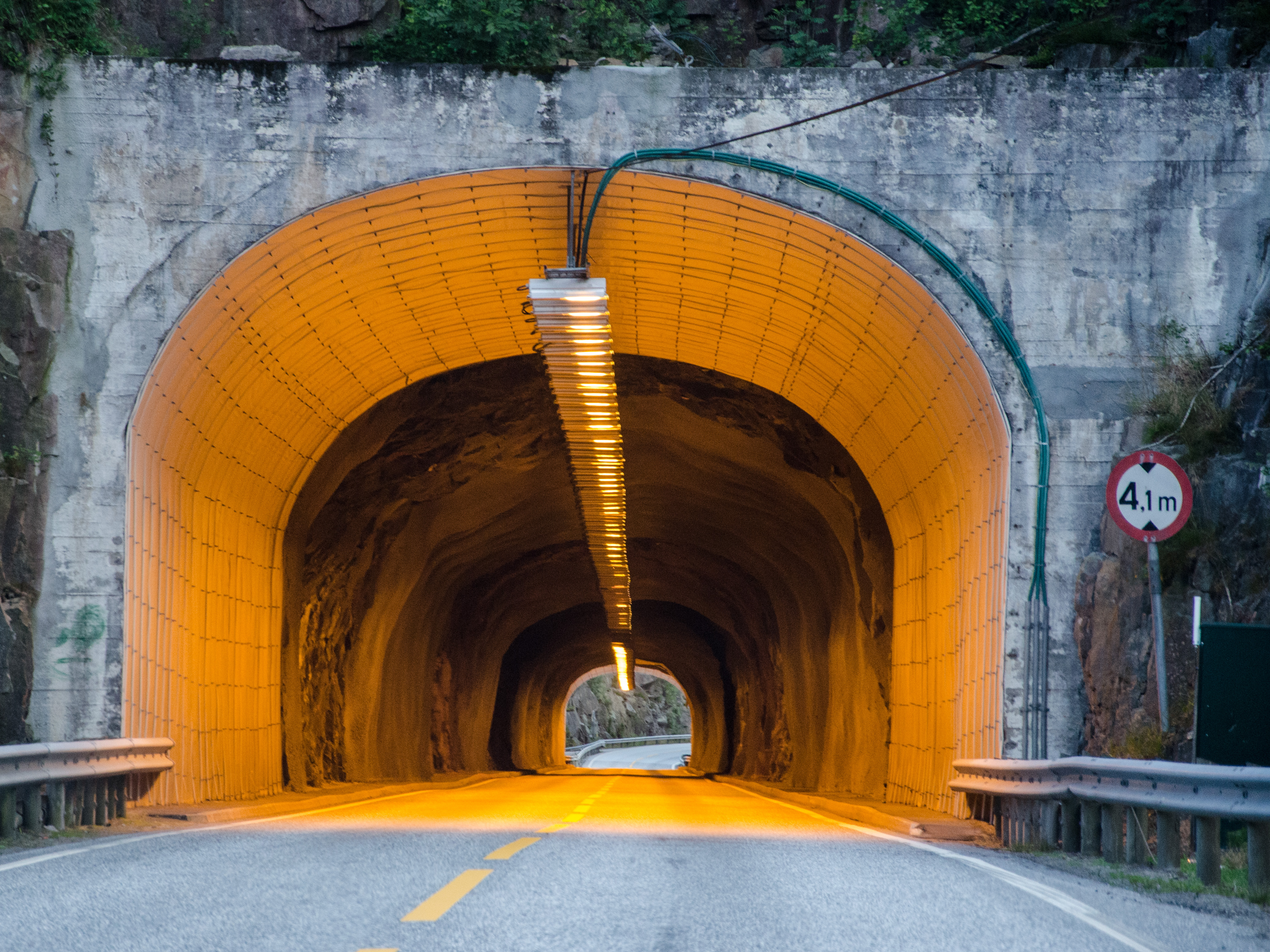 Trøde-Bråhei tunnel på Rv420